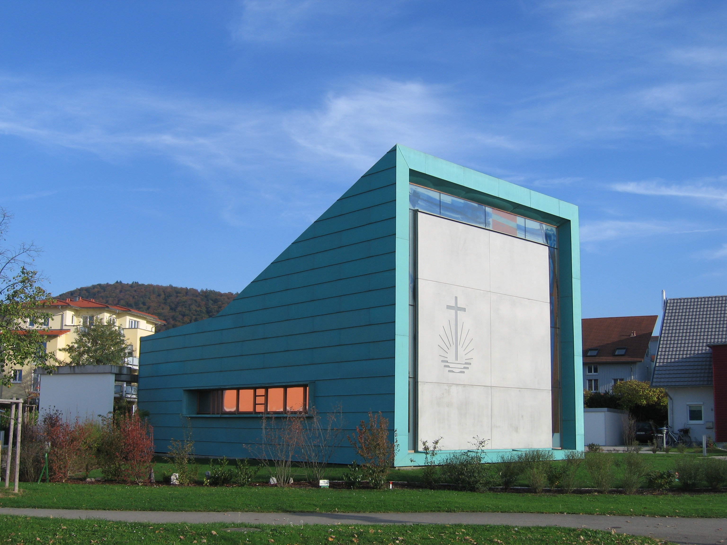 Neuapostolische Kirche im Wohngebiet "Heidach" in Denzlingen